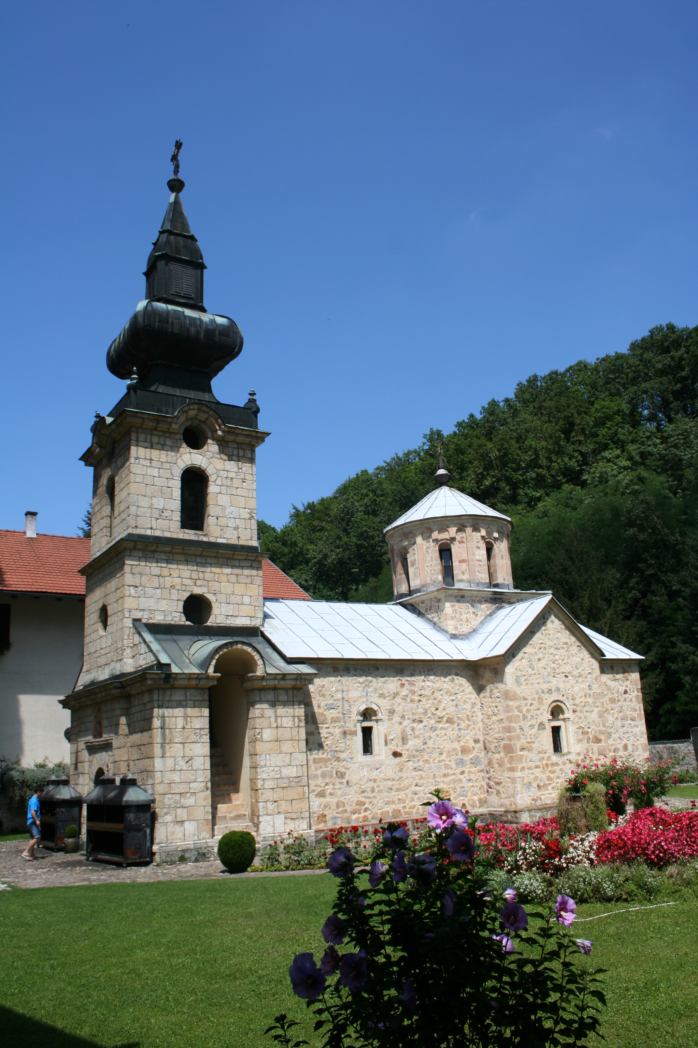 Manastir Tronoša